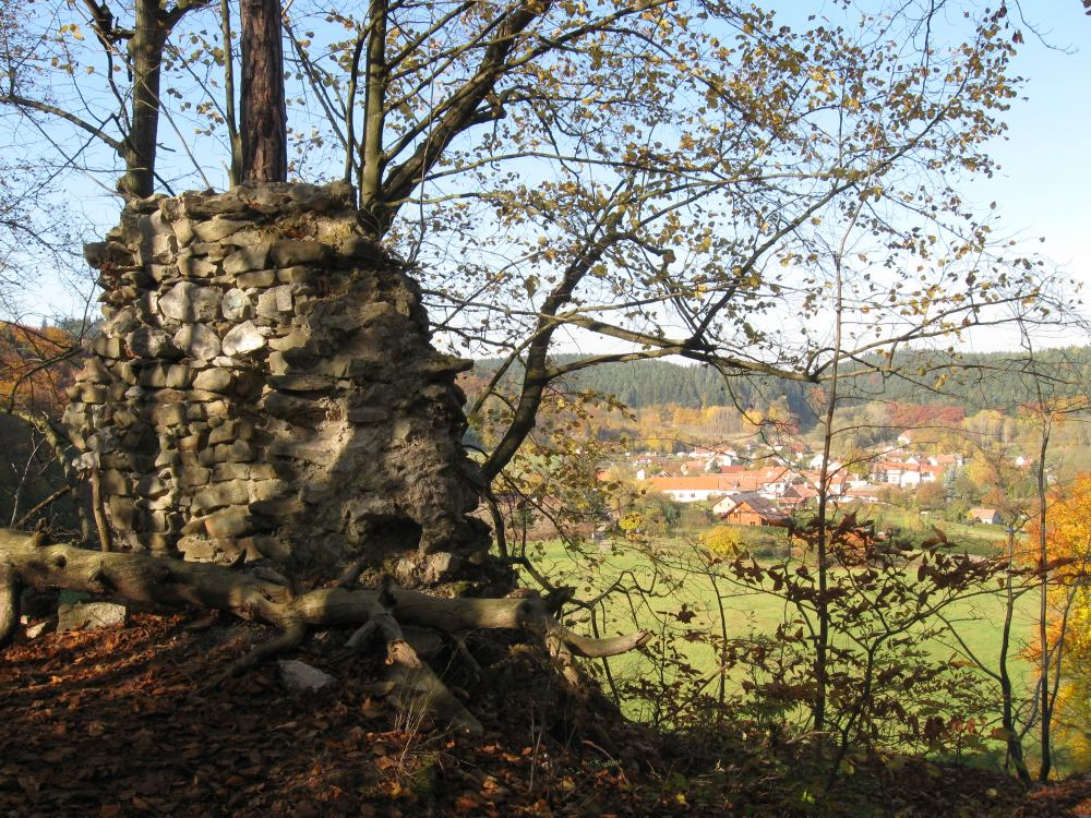 Česky: Zbytky zdí hradu Holštejna, v pozadí ves Holštejn